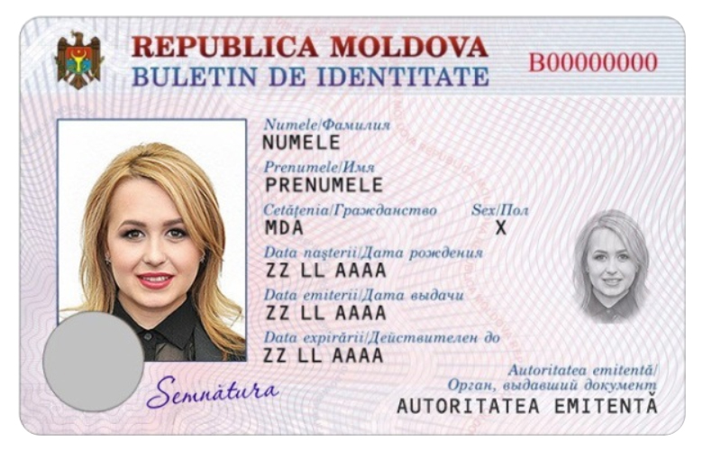 Buletin de identitate al cetăţeanului Republicii Moldova